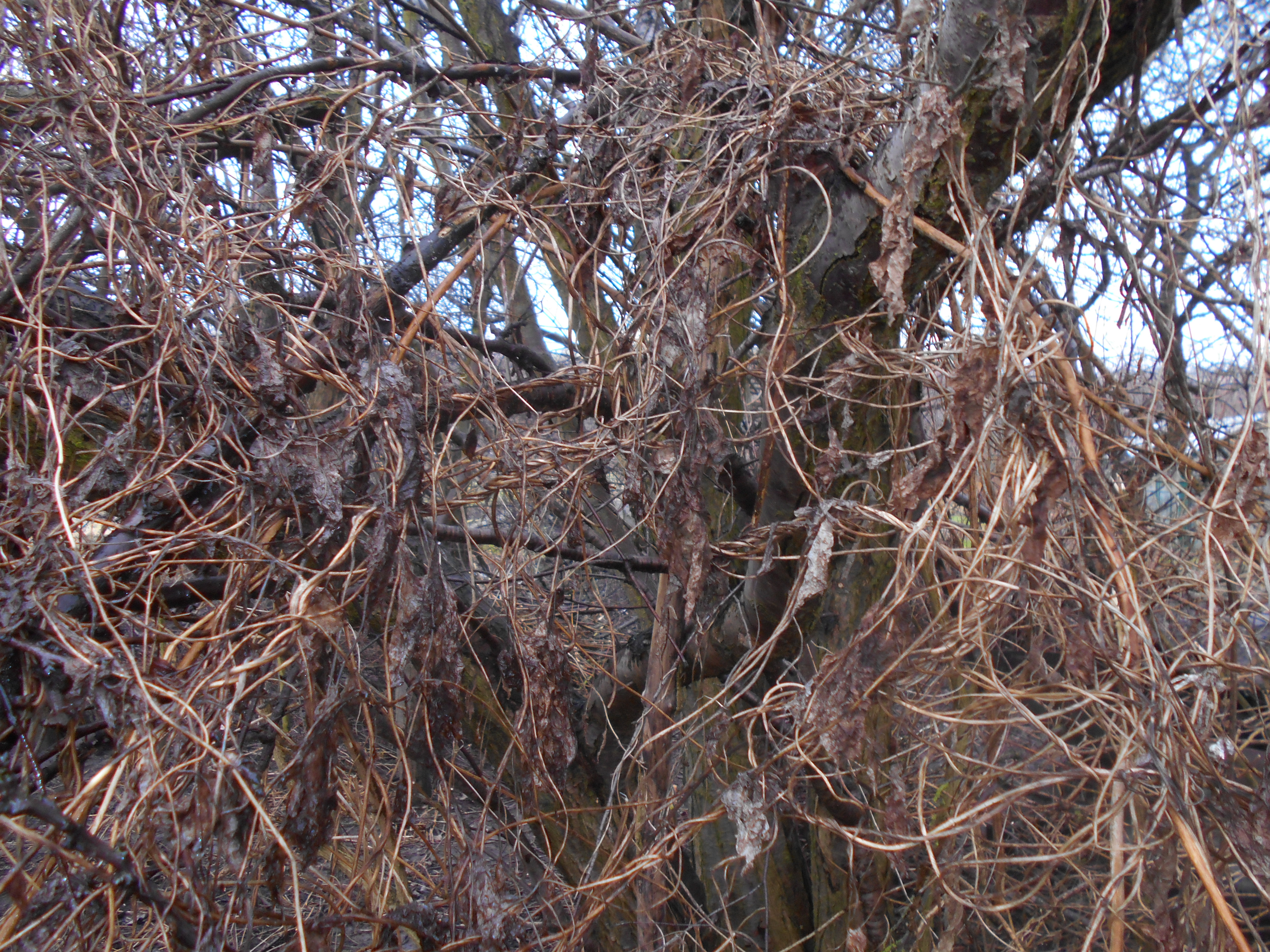 Kielisznik zaroślowy (Calystegia sepium).